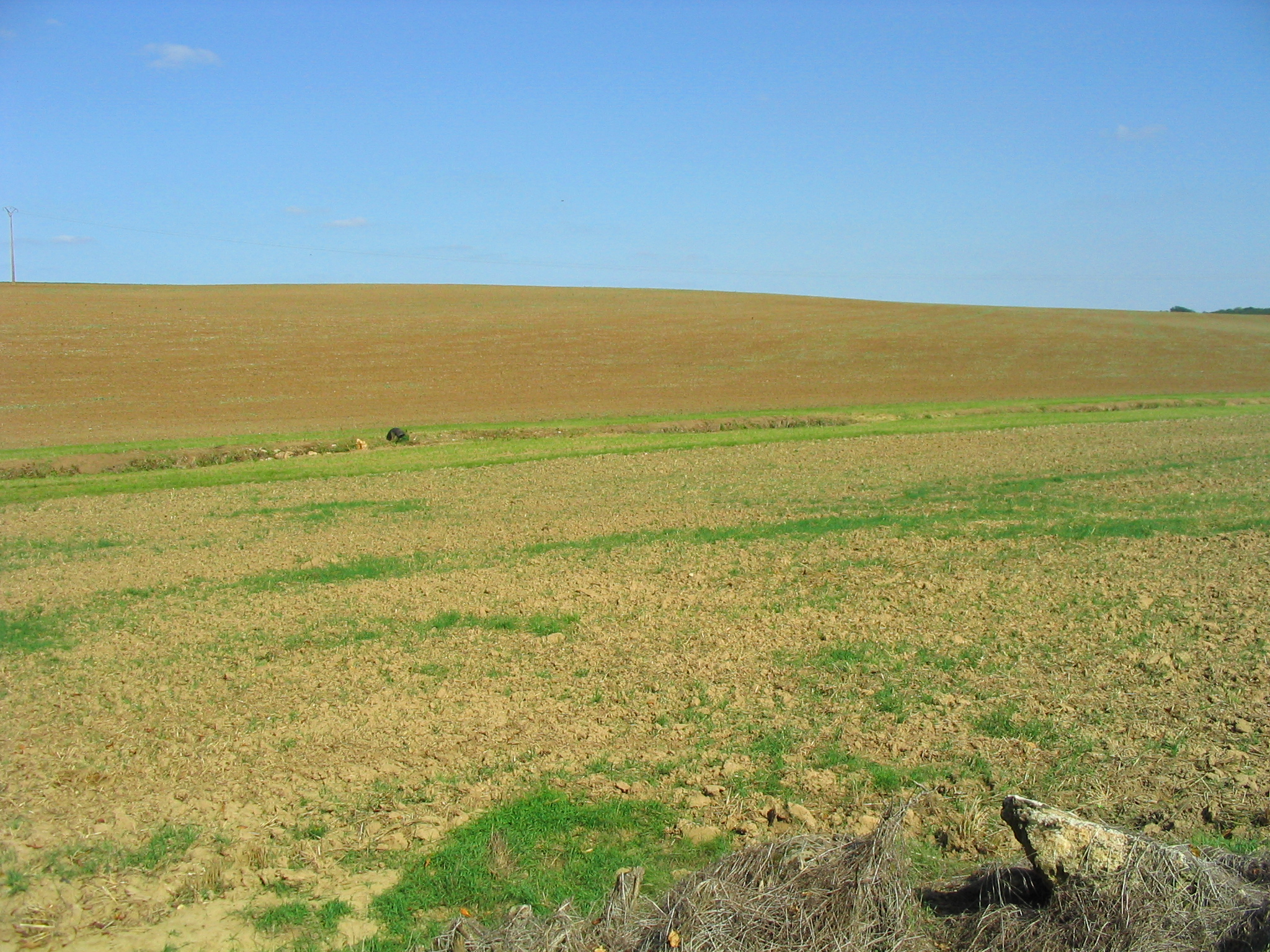 La partie sud de Savigny-le-Temple, France. Auteur:User:Tej. Photographie prise le 5 septembre 2006.